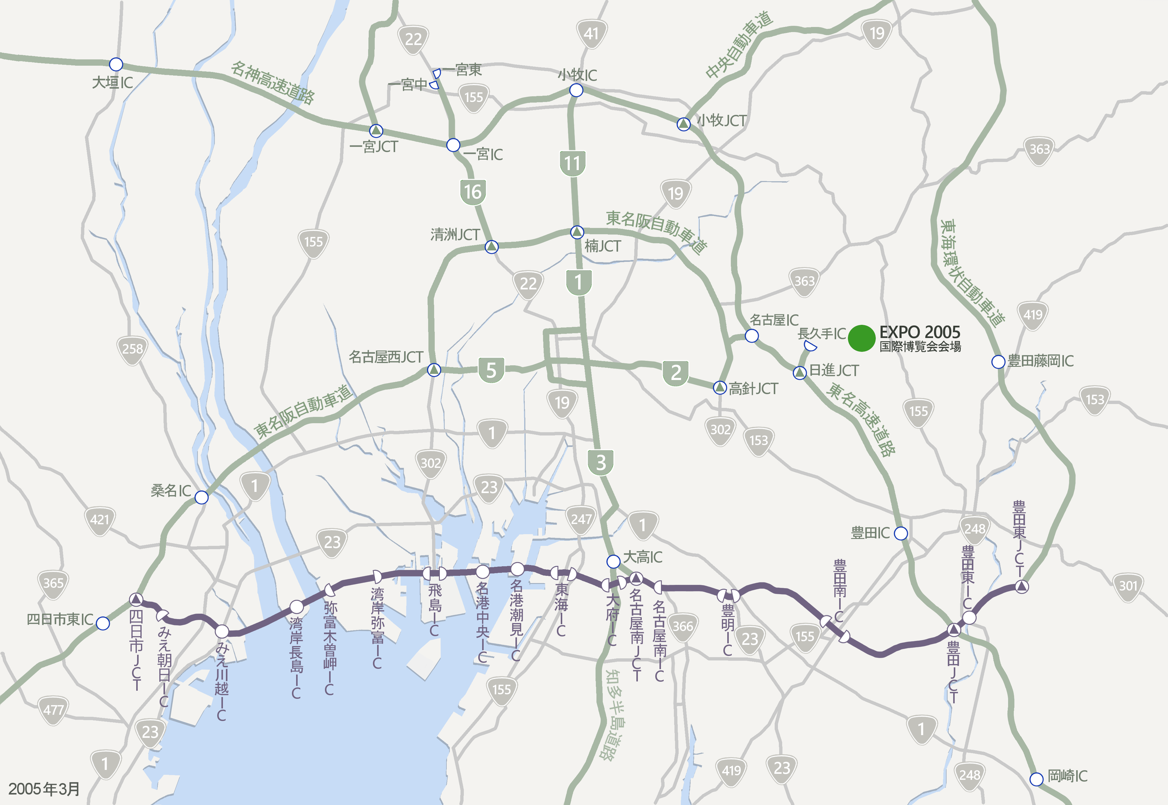 伊勢湾岸自動車道2005年3月時点